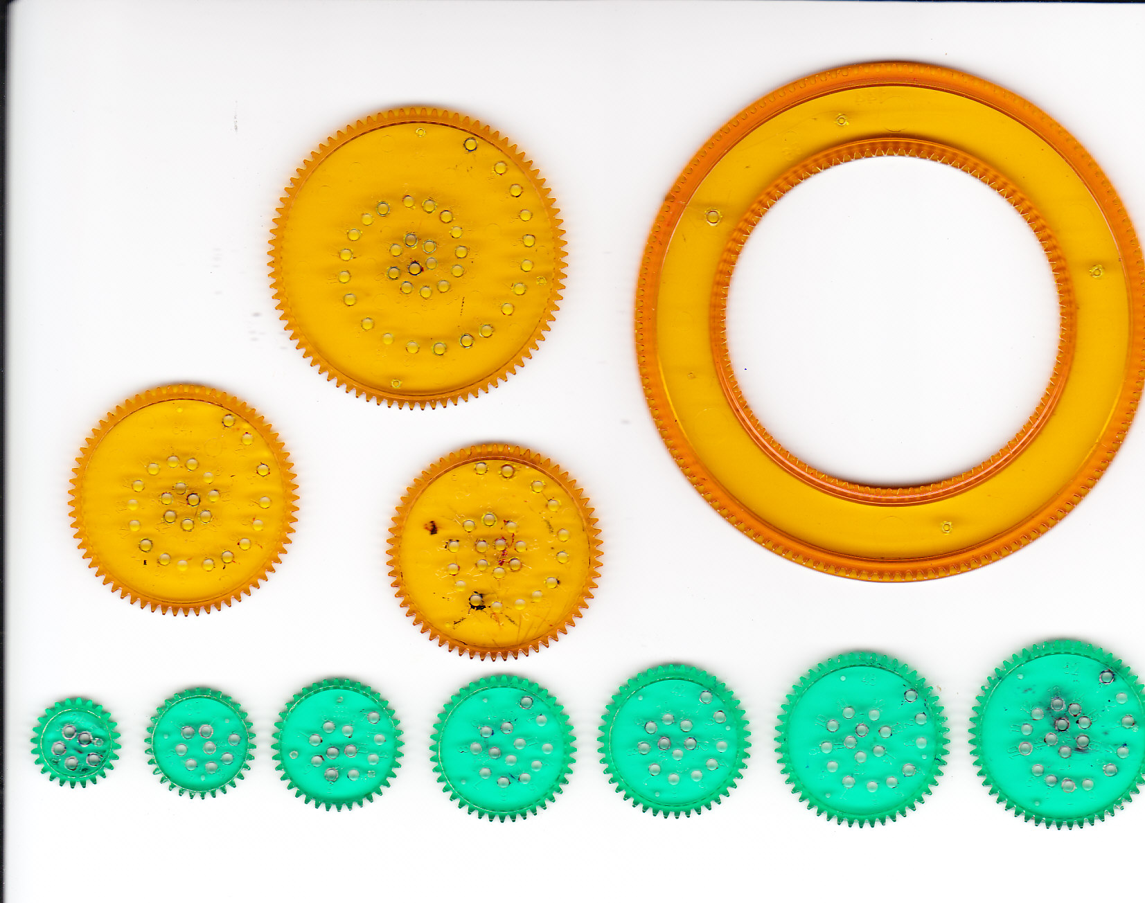 Nyújtott epi- és hipocikloisokat rajzoló eszköz